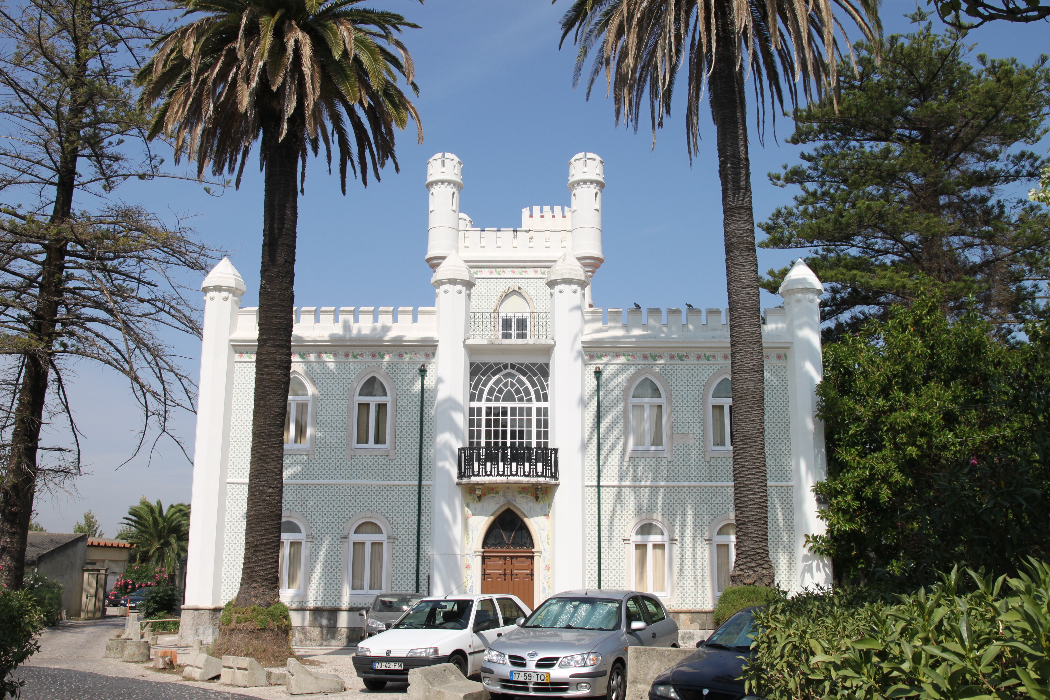 Quinta da Torrinha / Castelinho This file was uploaded for Wiki Loves Monuments in Portugal with the unique identifier 97030919.